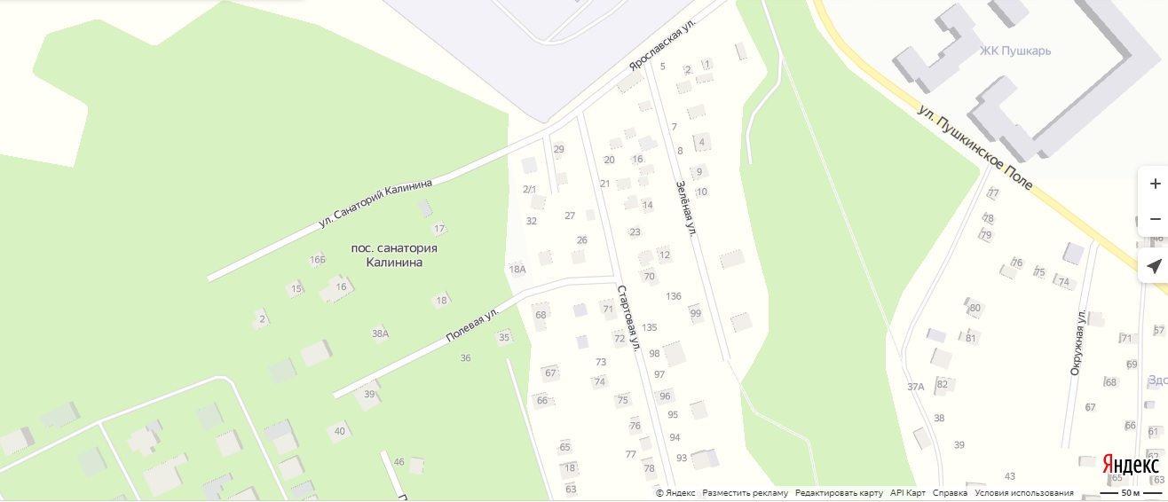 улица Санаторий Калинина